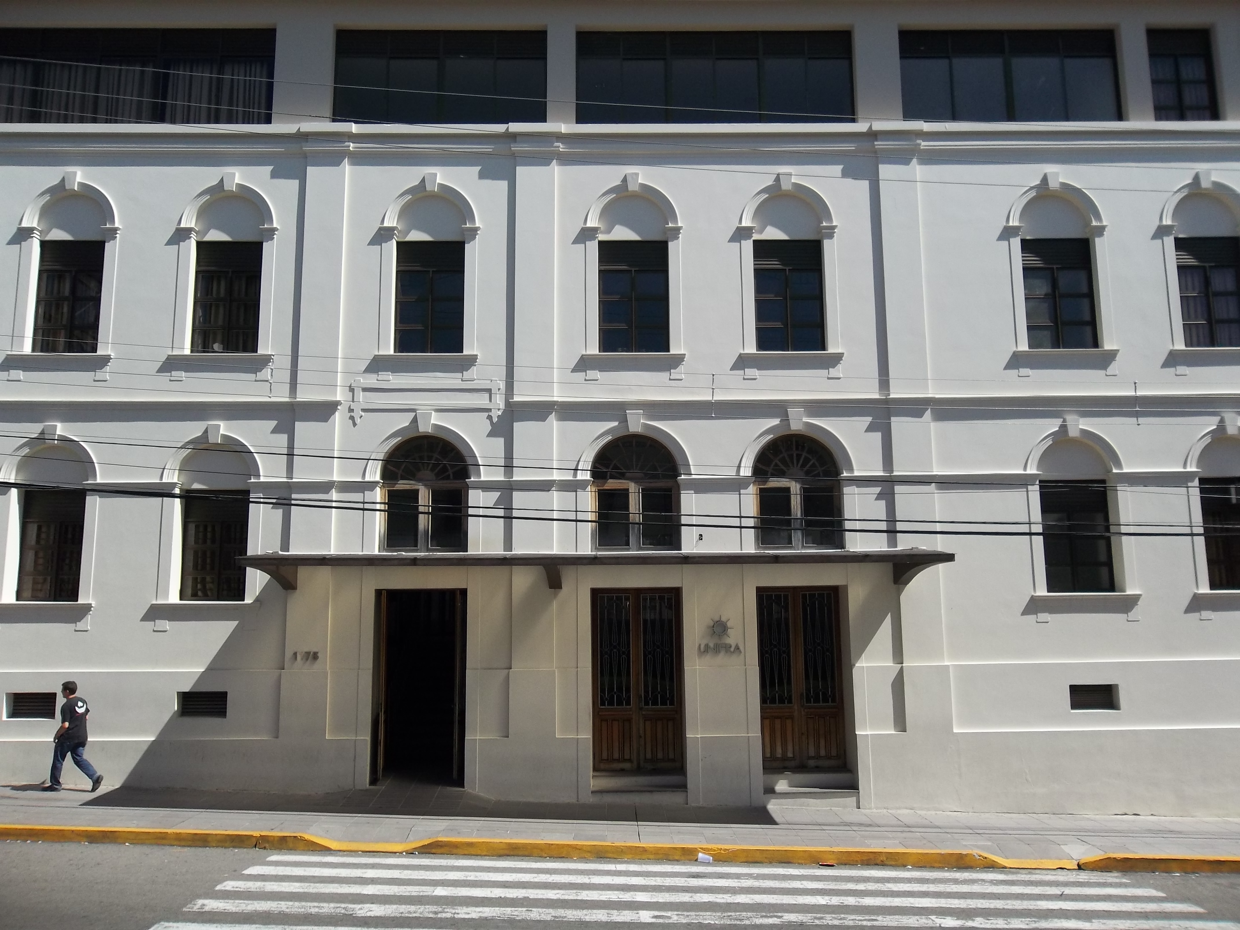 Centro Universidade Franciscana - Rua Silva Jardim, Bonfim, Santa Maria, Rio Grande do Sul, Brasil